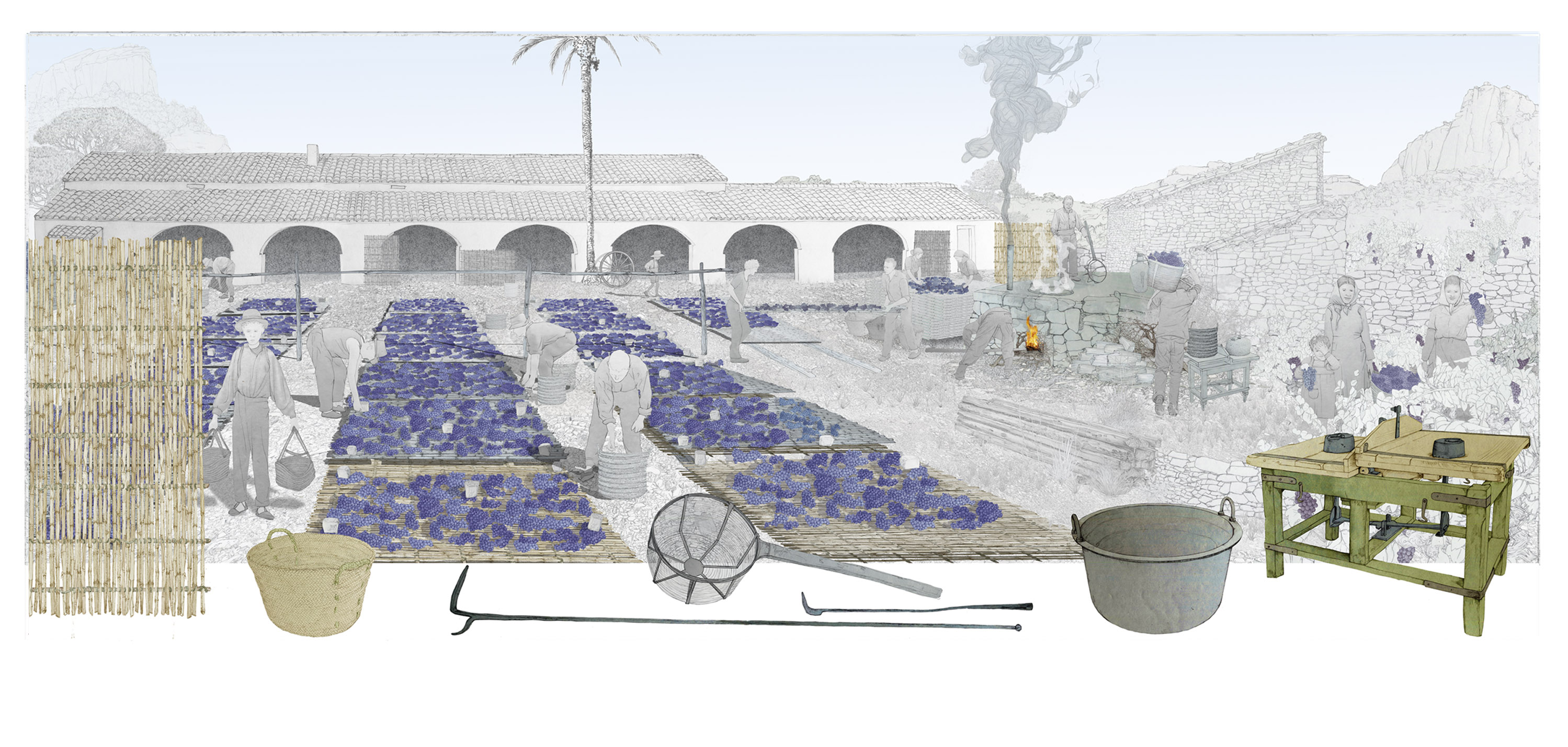 Il·lustracions d'Andrés Marín Jarque per a l'exposició permanent "Secà i Muntanya" del Museu Valencià d'Etnologia. S'il·lustren els escenaris del medi rural i el procés (treball) mitjançant el qual s'aprofita este espai.